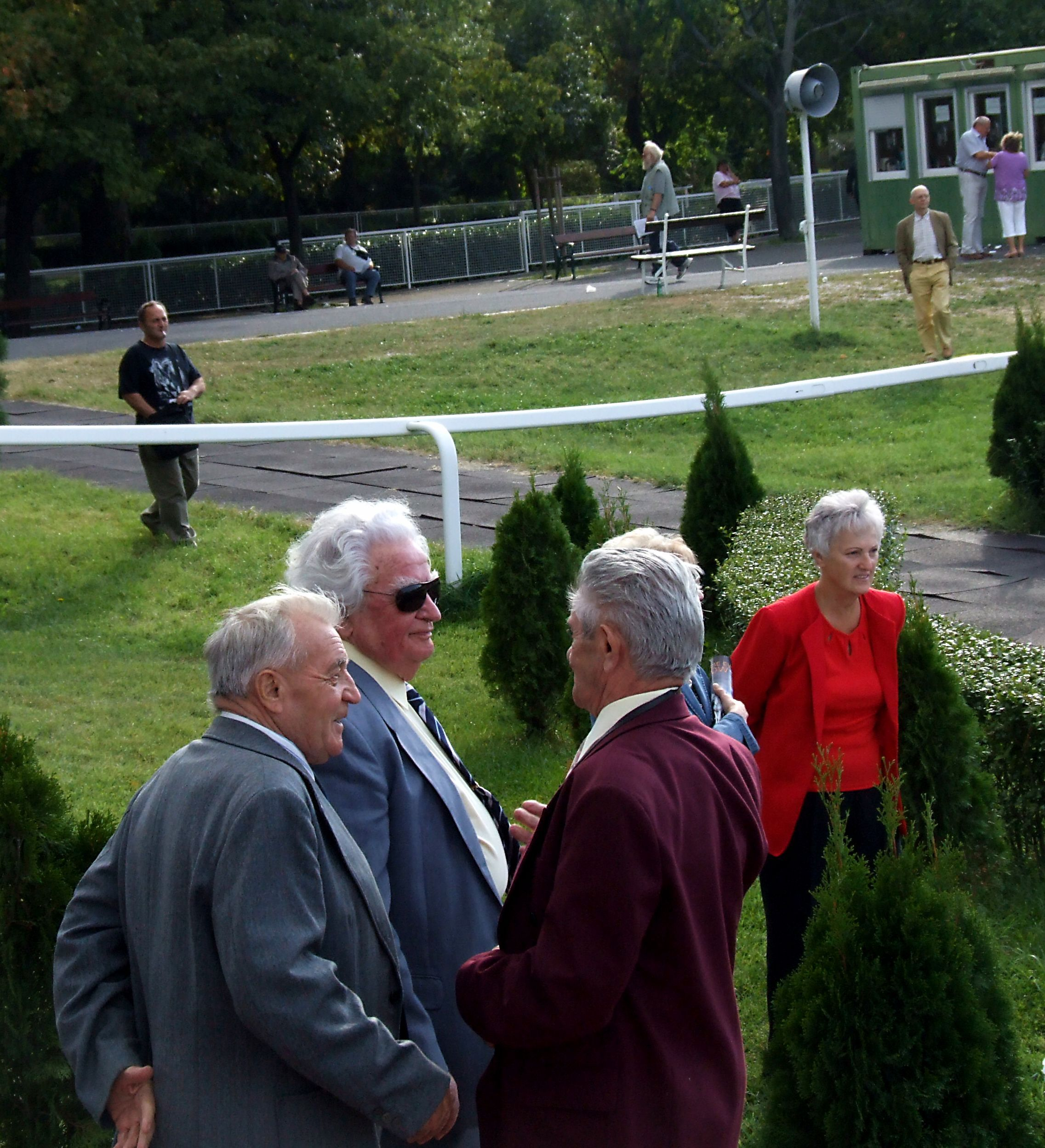 Nagy idők tanúi balról jobbra Németh Ferenc és Aperianov Zakariás. Kincsem Park.